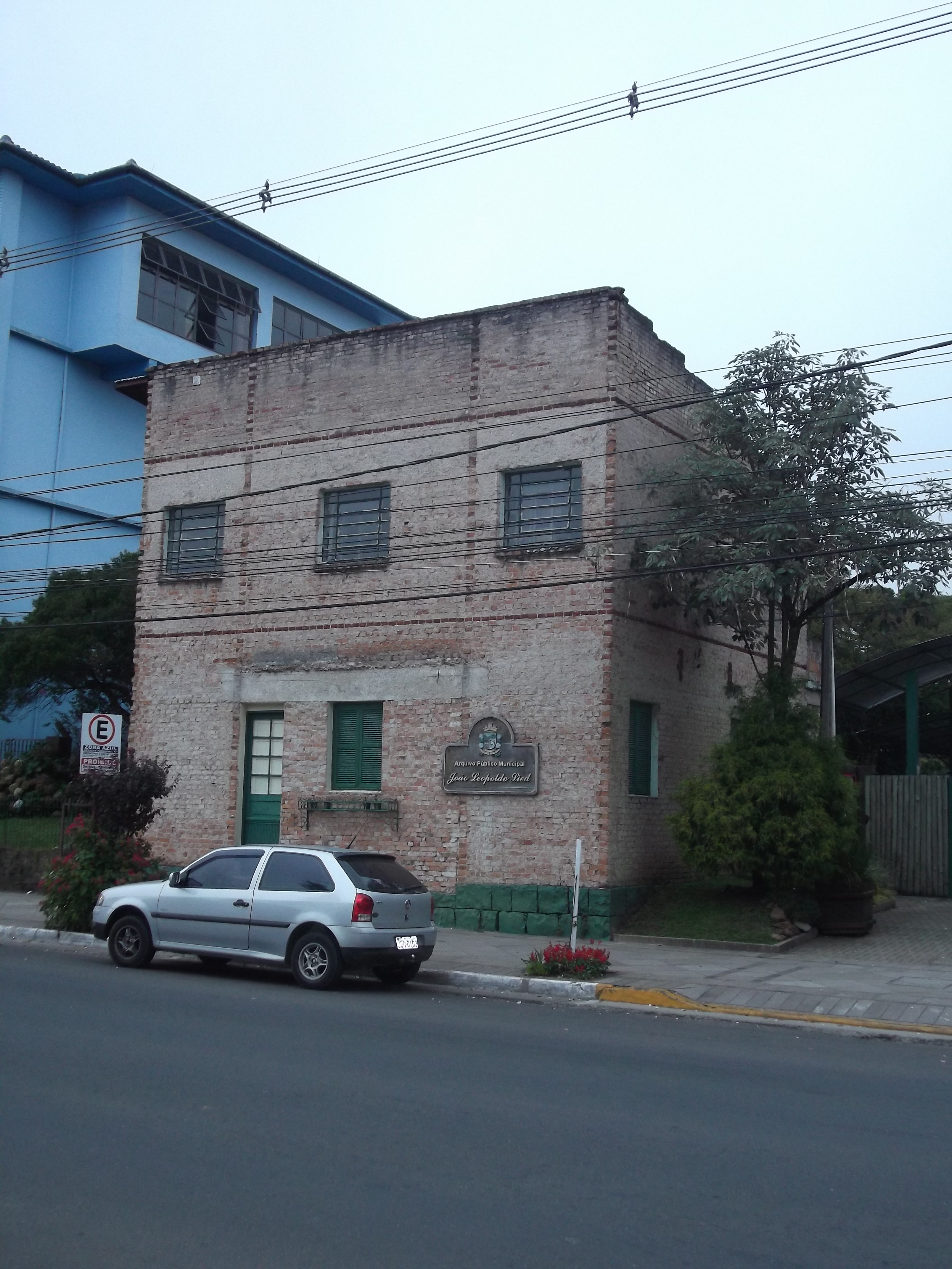 Arquivo João Leopoldo Lied, Gramado, Brasil